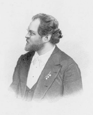 Stich nach einer Fotografie des Komponisten Josef Krug-Waldsee